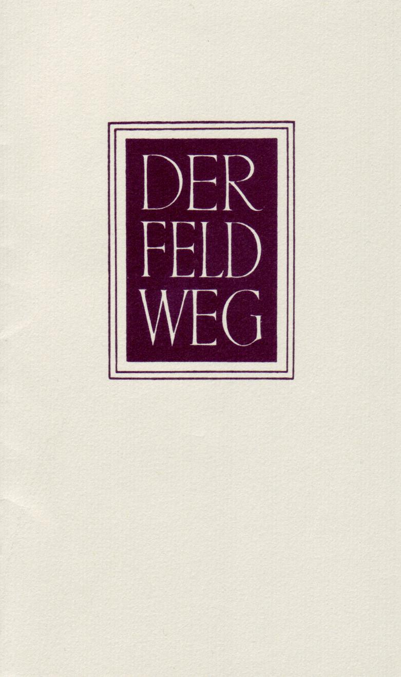 Martin Heidegger "Der Feldweg", Vittorio-Klostermann Verlag